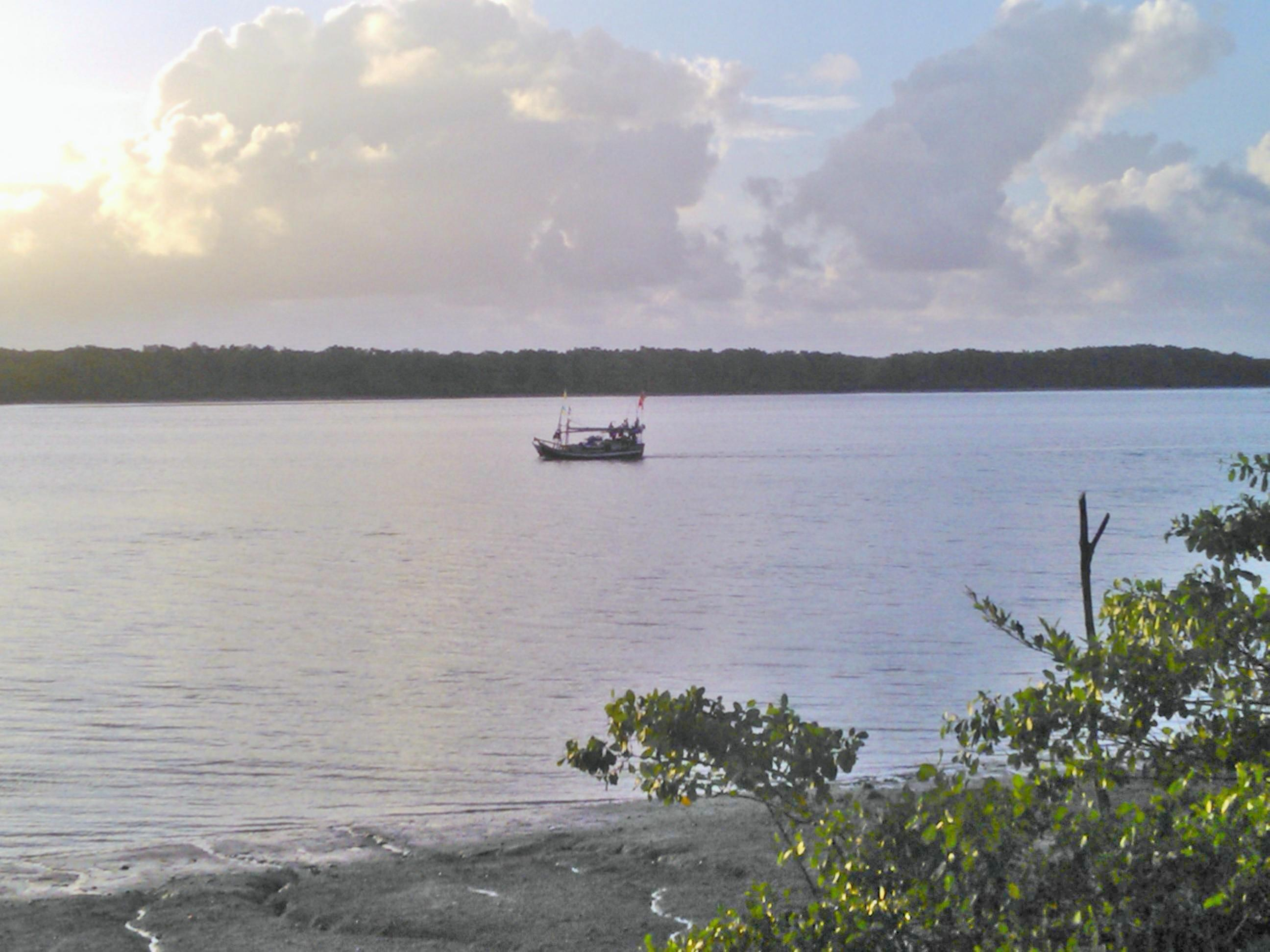 Final da tarde as margens do rio em Curuçá-PA